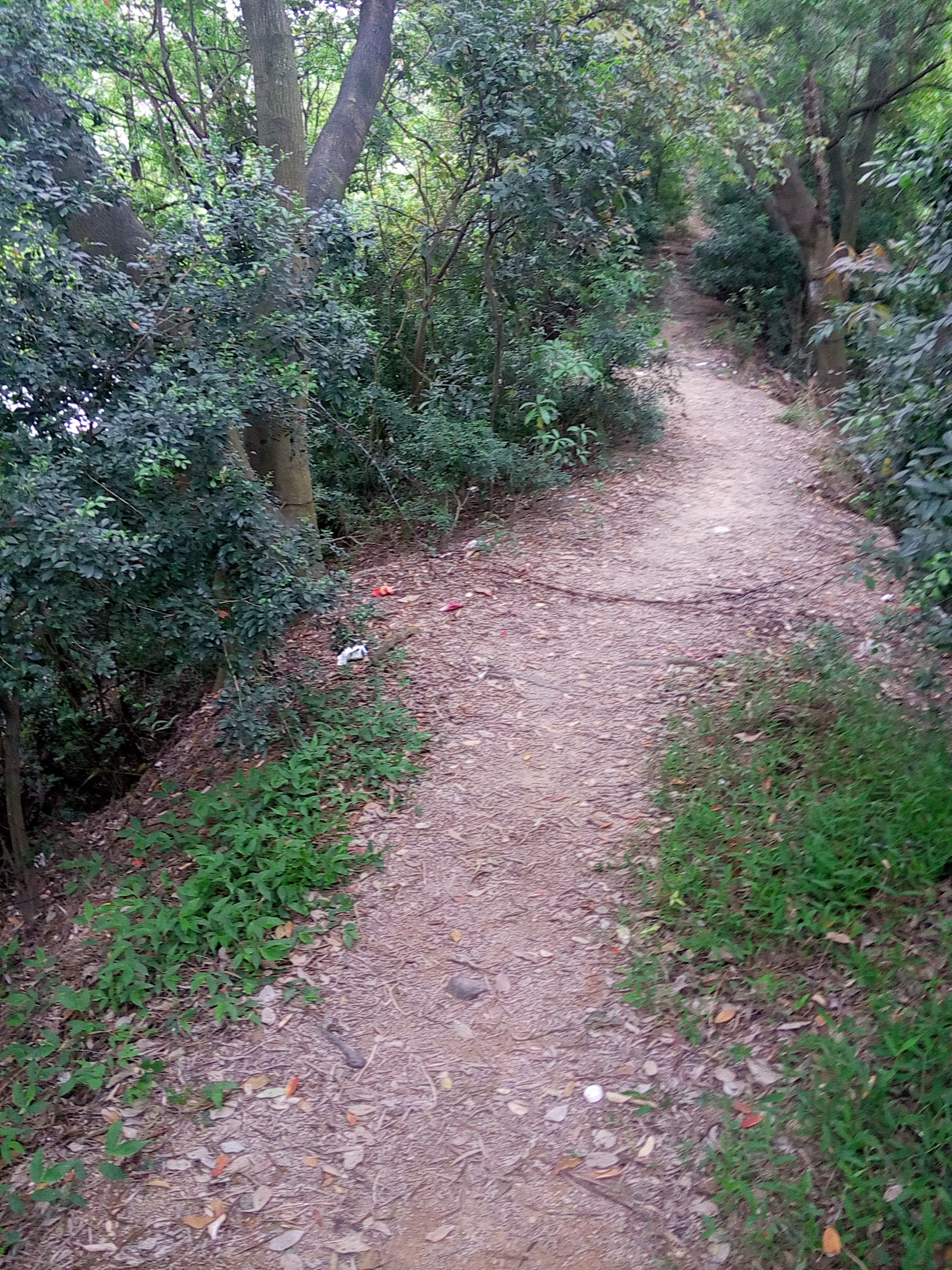 Zhongshan Park Shenzhen China